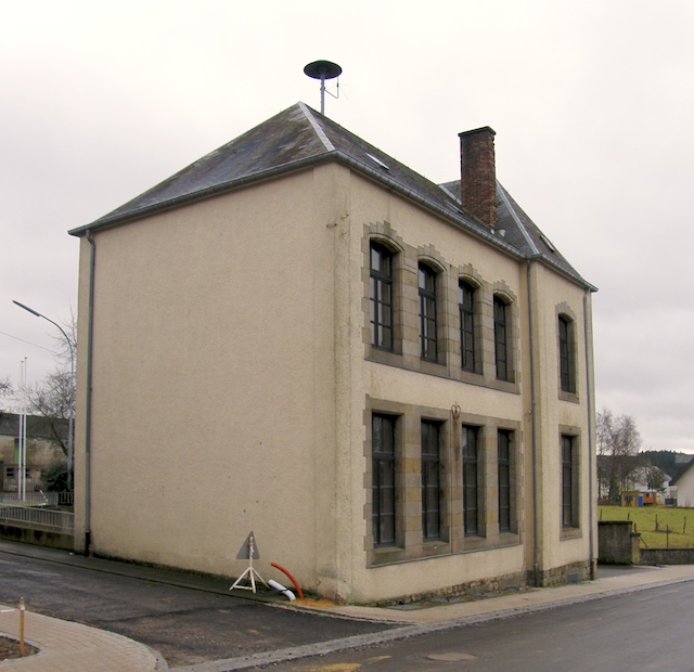 Sujet: Déi al Bungereffer Schoul. Kategorie:Gemeng Rammerech